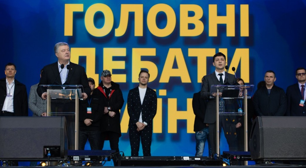 Дебаты кандидатов на пост Президента Украины Петра Порошенко и Владимира Зеленского